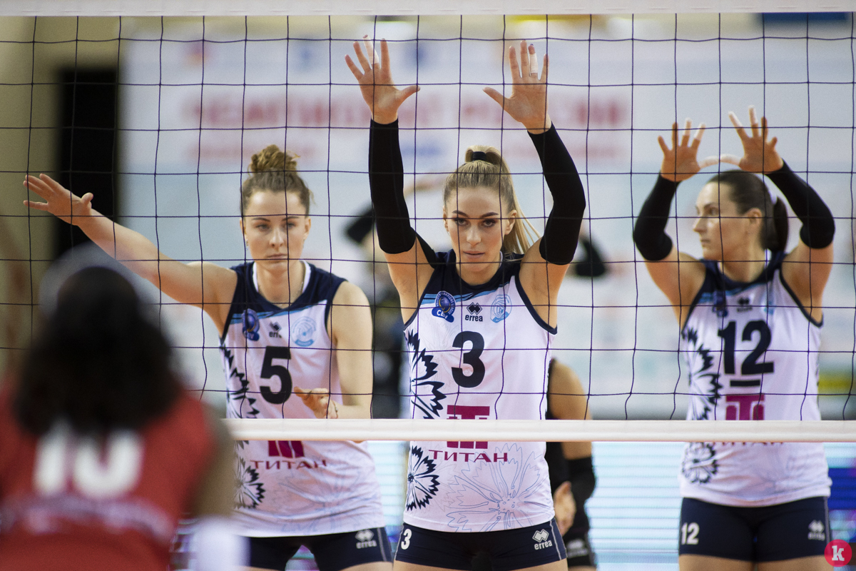 Локомотив (Калиниград) -Минчанка 3:0 (16.03.2019) Чемпионат России, Тур 21